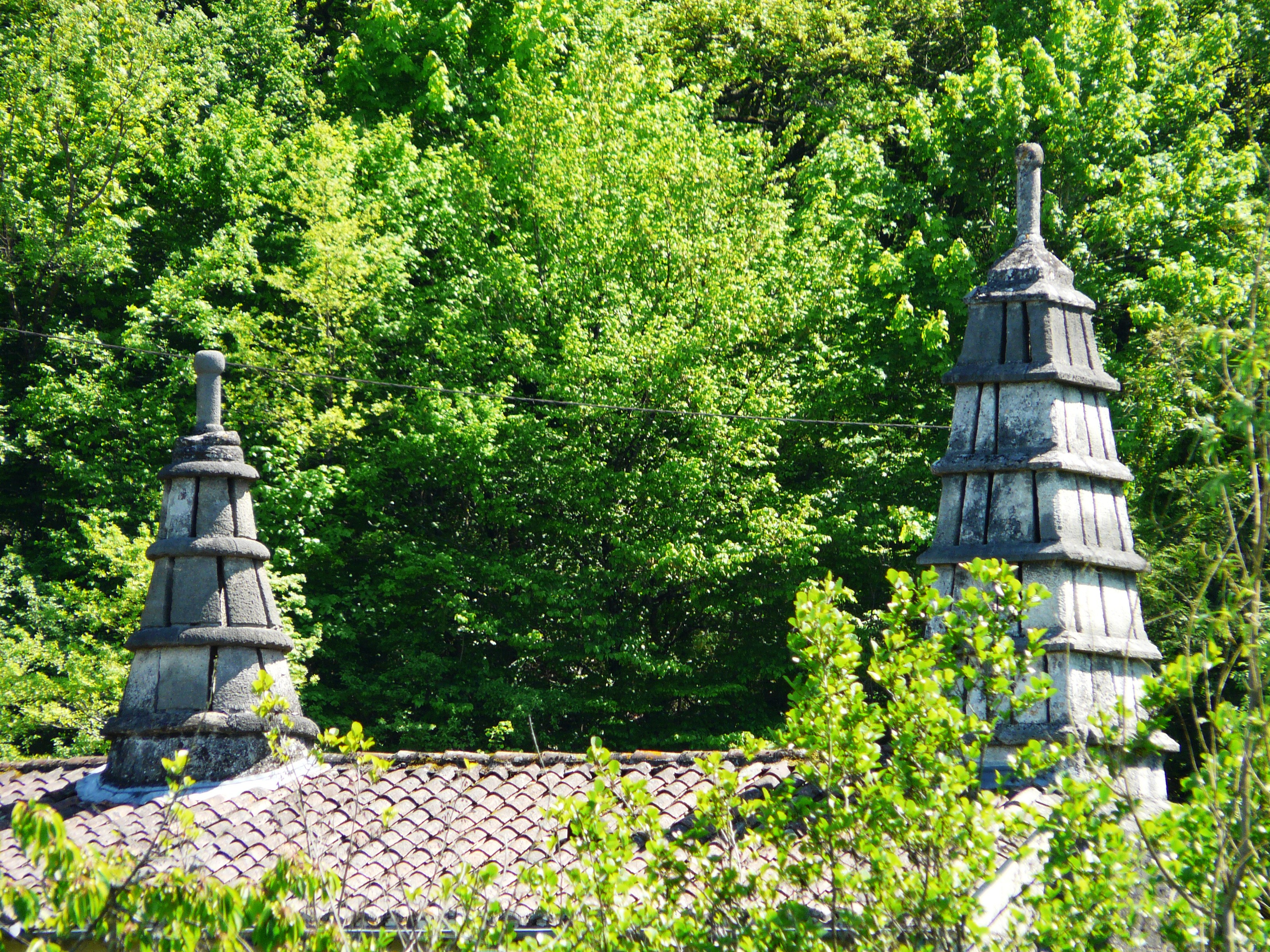 Les cheminées de la Maladrerie, Coulounieix-Chamiers, Dordogne, France.